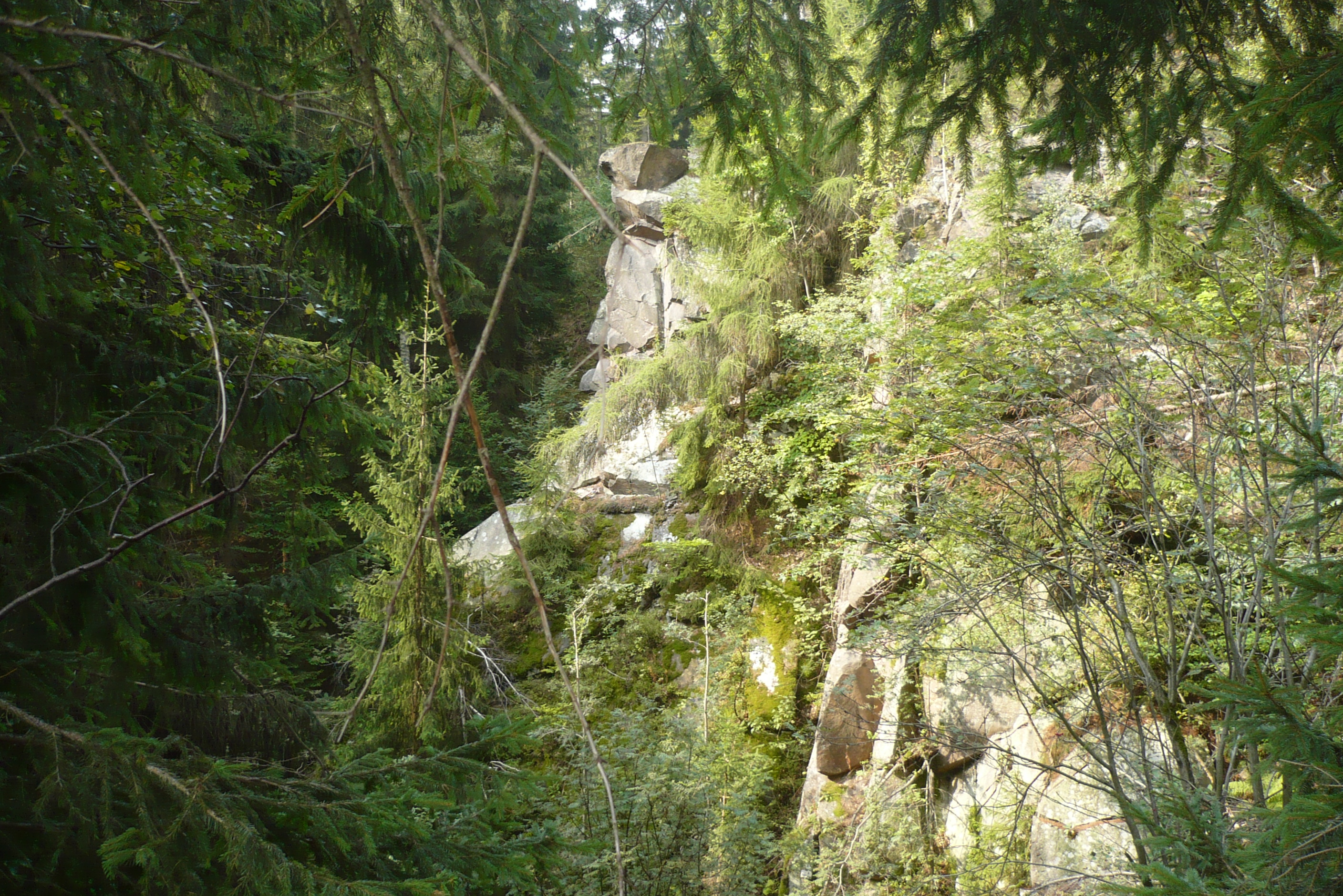 Bartnica. Kamieniołom